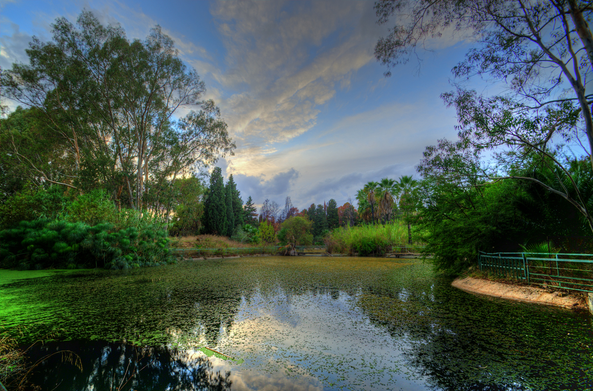 Chiuse del Ciane